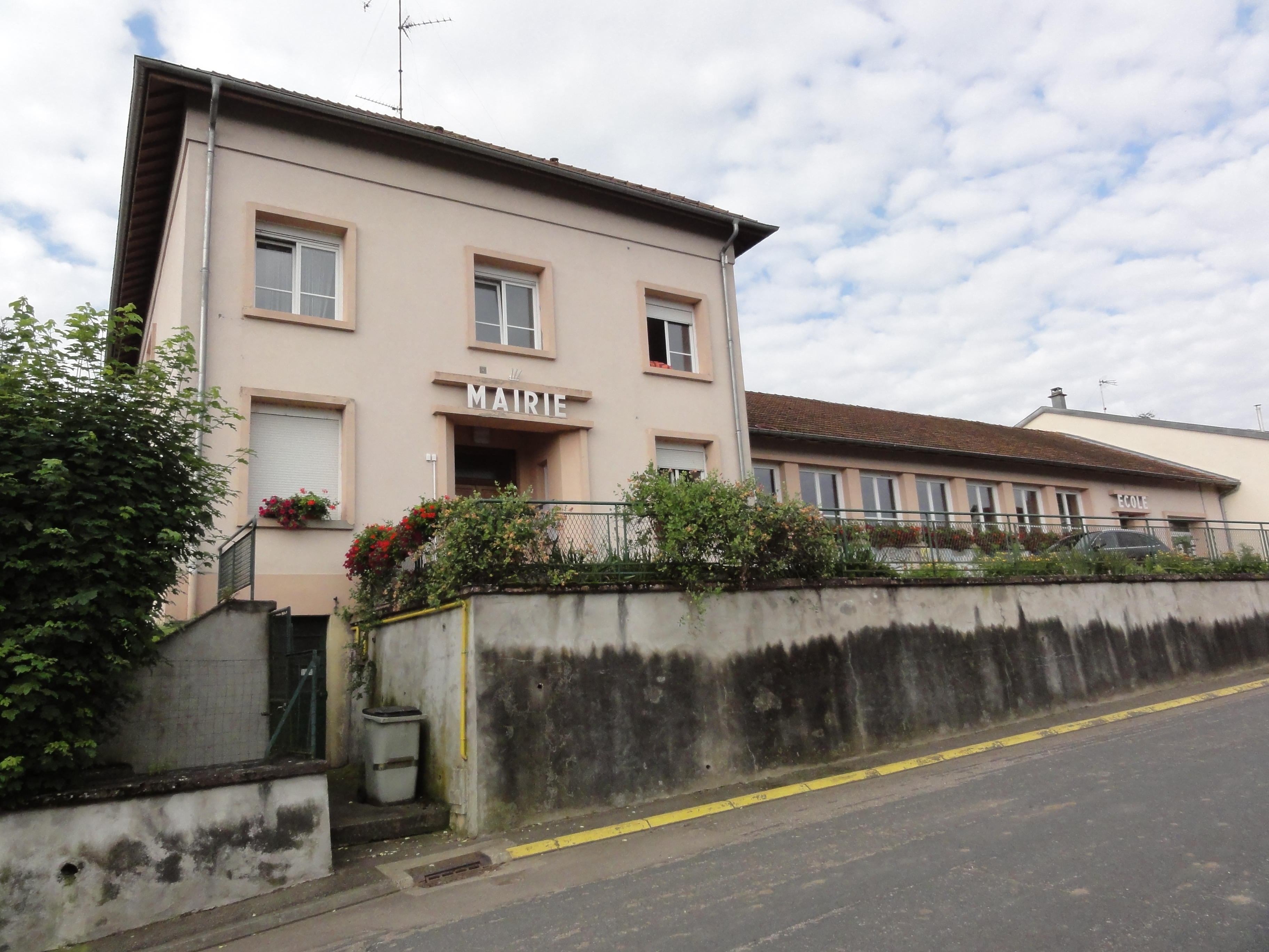 Jolivet (M-et-M) mairie avec école